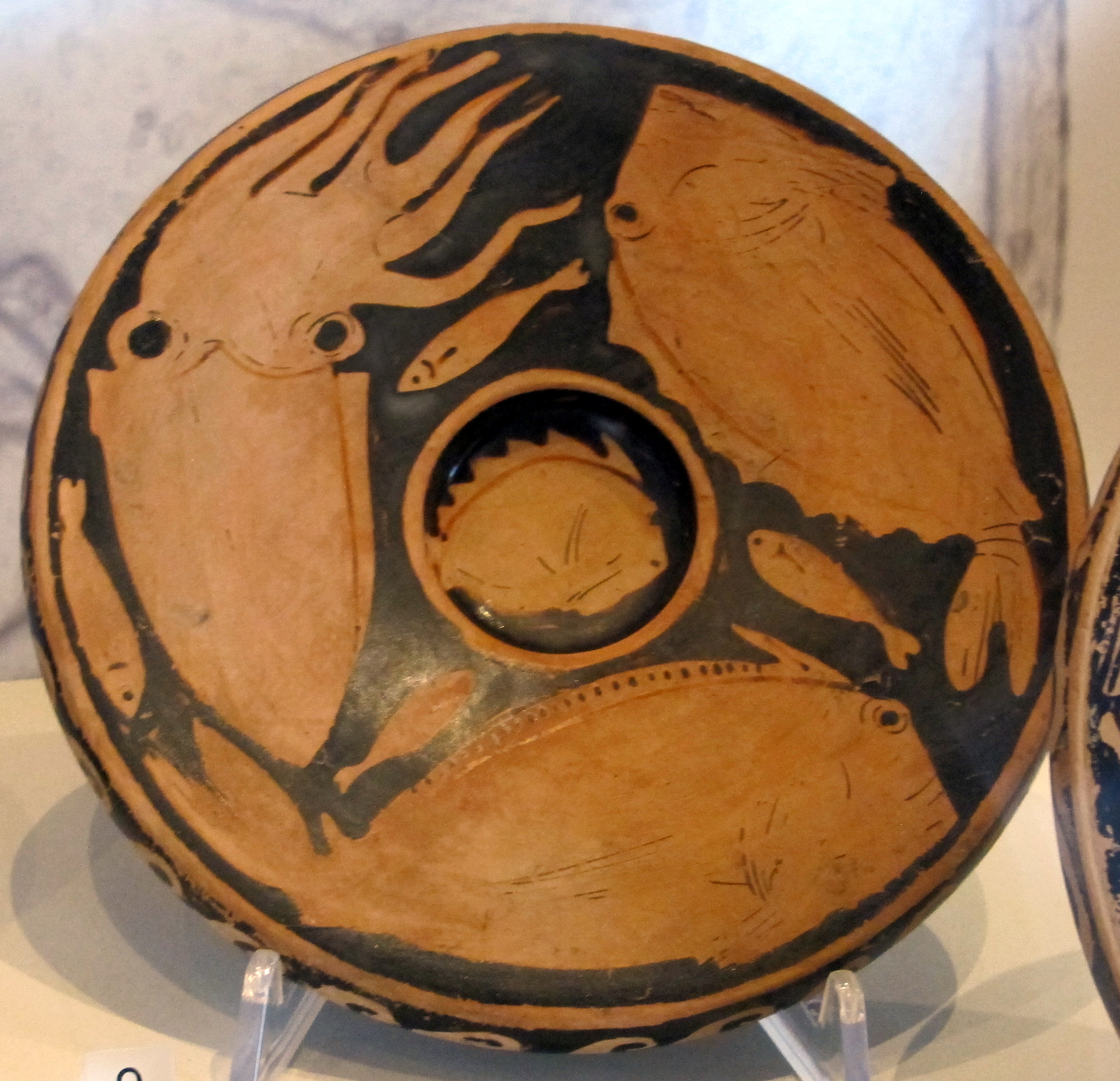 Museo Archeologico Nazionale - MIBAC This is a photo of a monument which is part of cultural heritage of Italy.